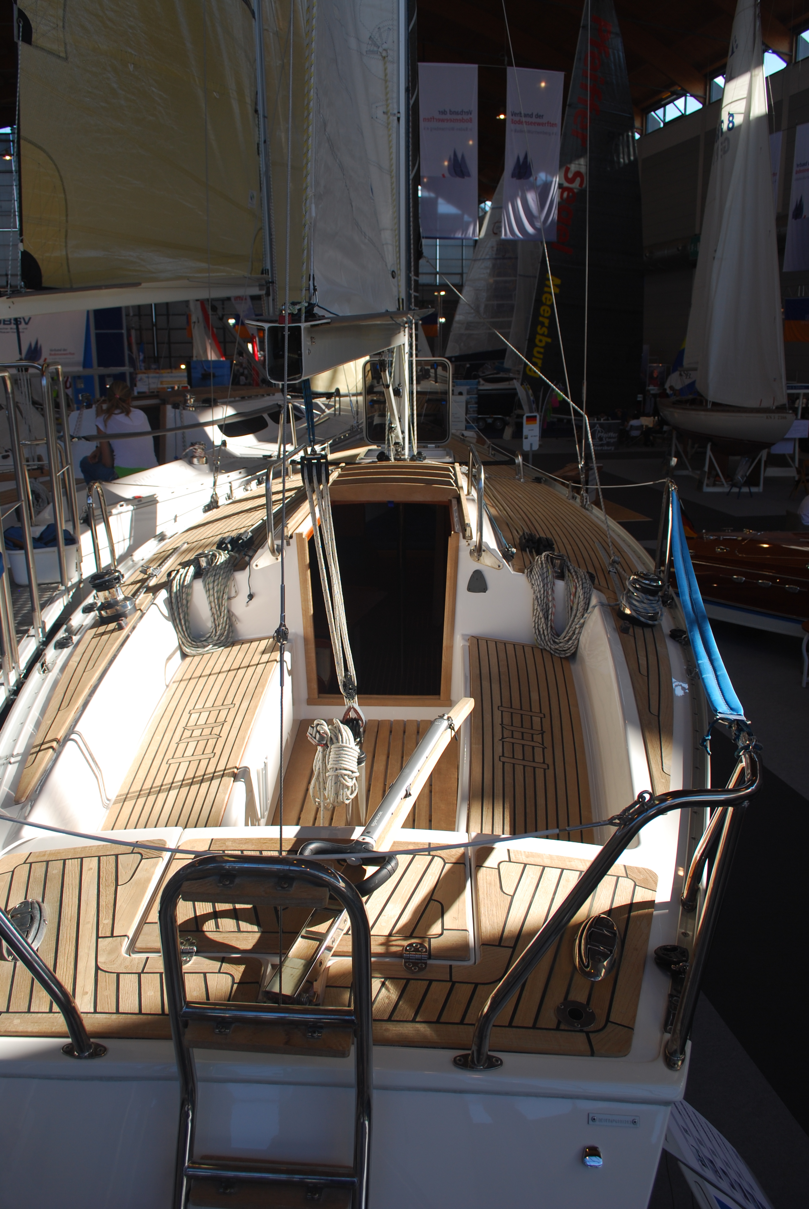 Deckslayout einer werftneuen Aphrodite 101, präsentiert an der Interboot 2014